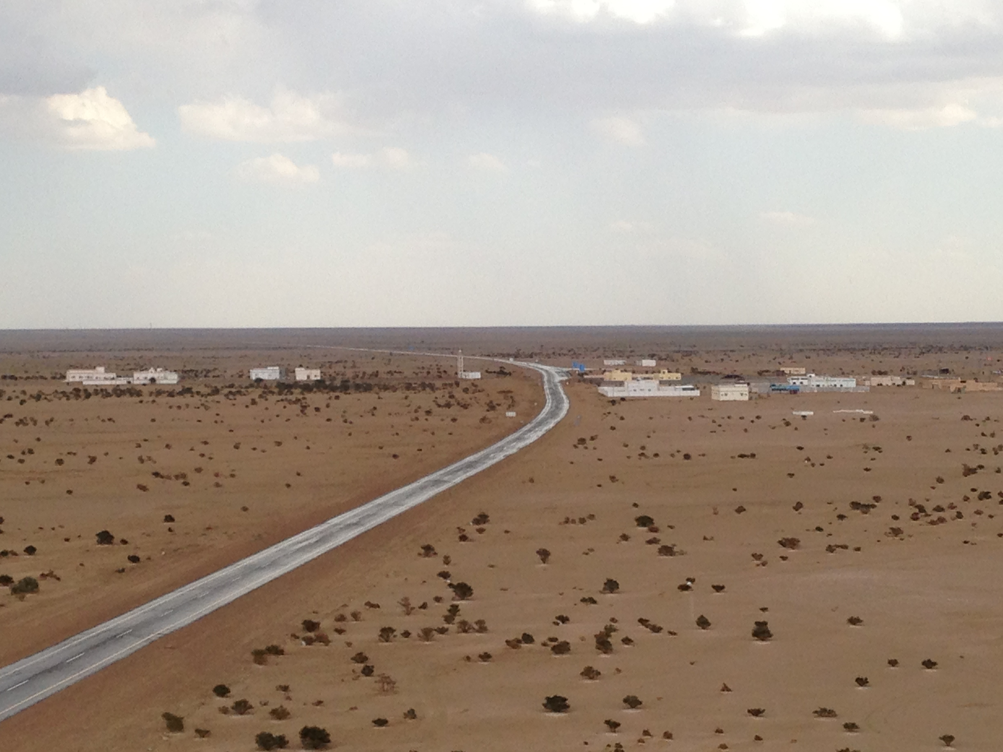 أثناء هطول الأمطارتصوير لمركز الرويلية الصهلوج